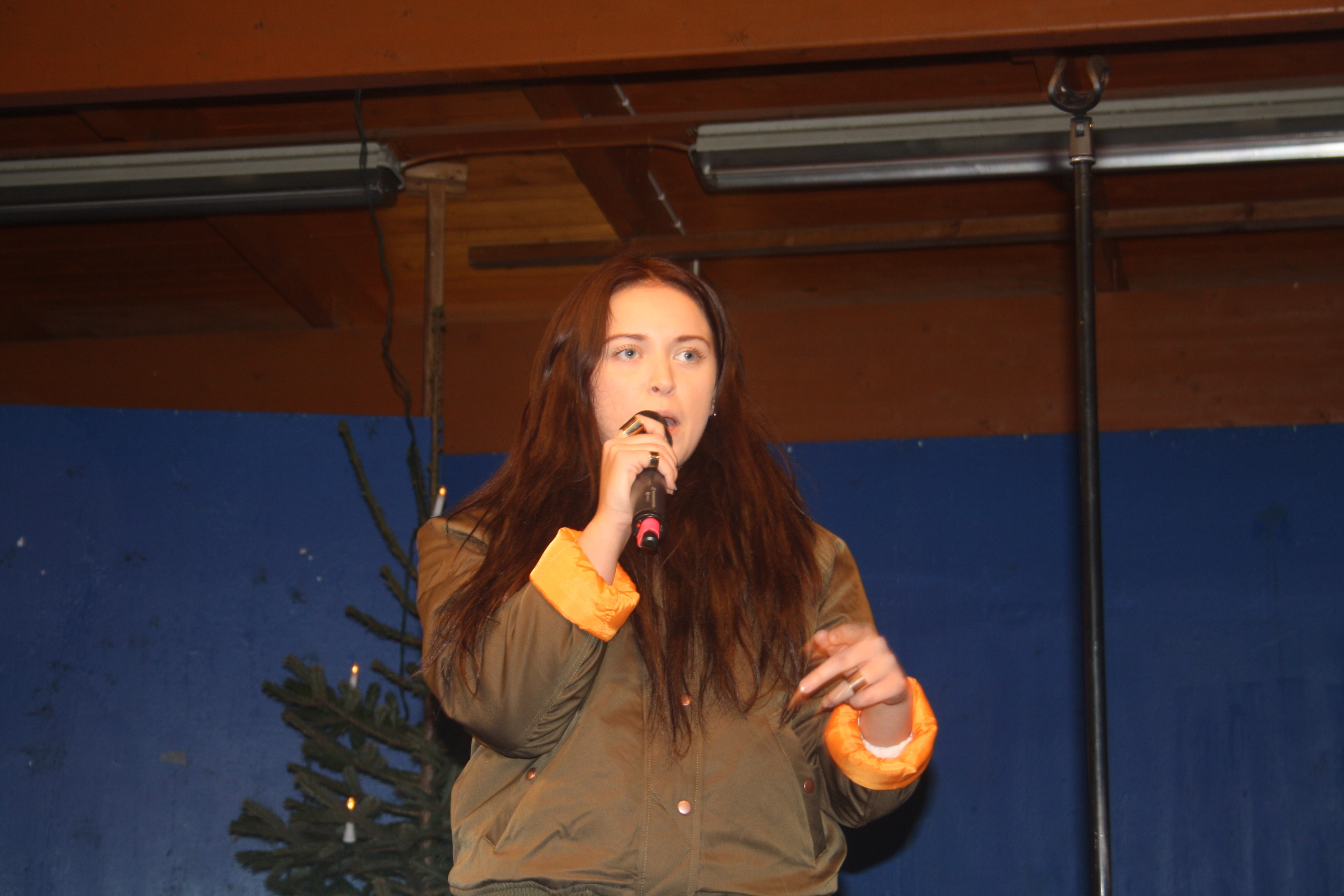 Elin Bergman uppträder i Huddinge Centrum